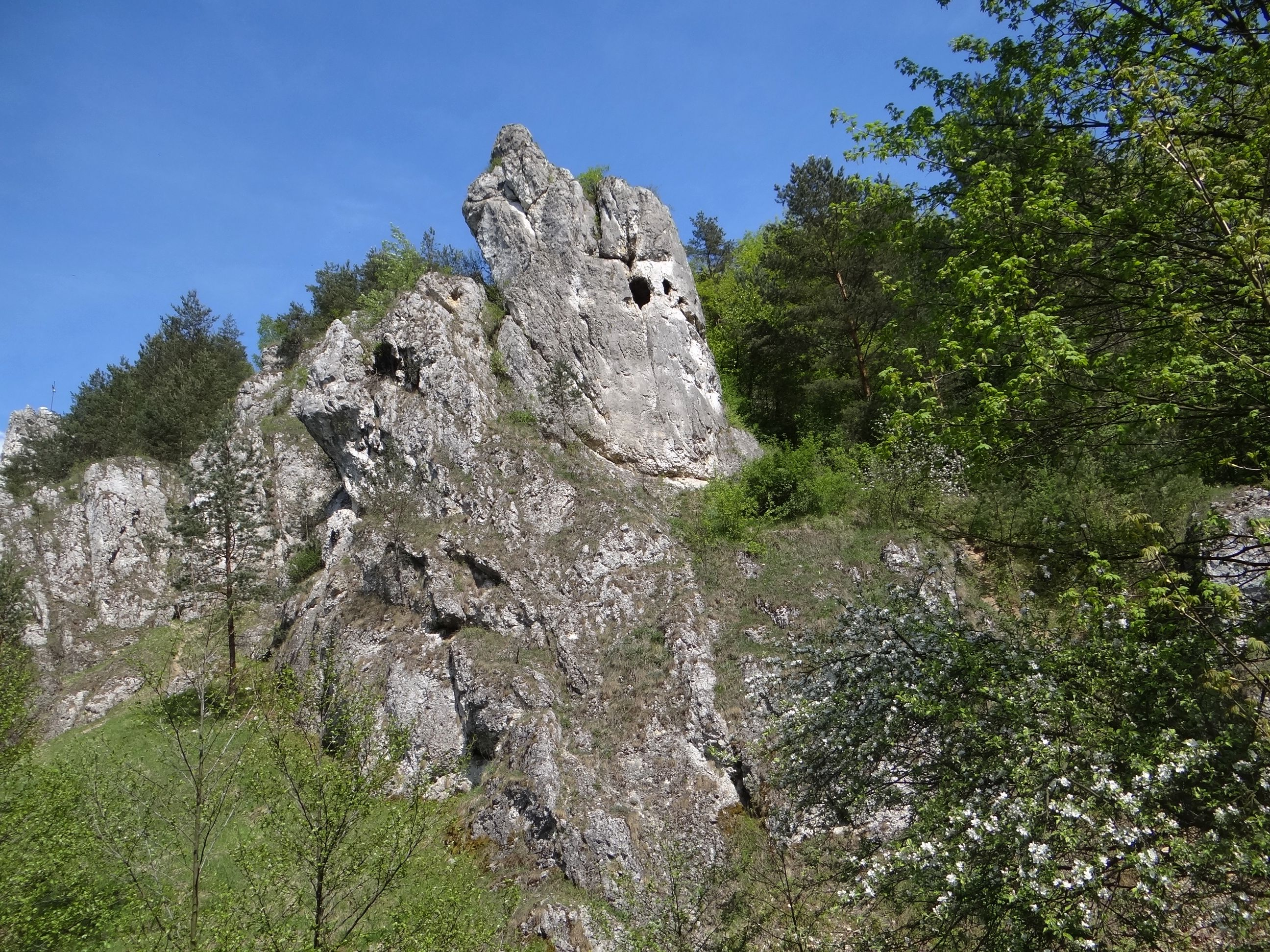 Turnia Mnich w Dolinie Kobylańskiej